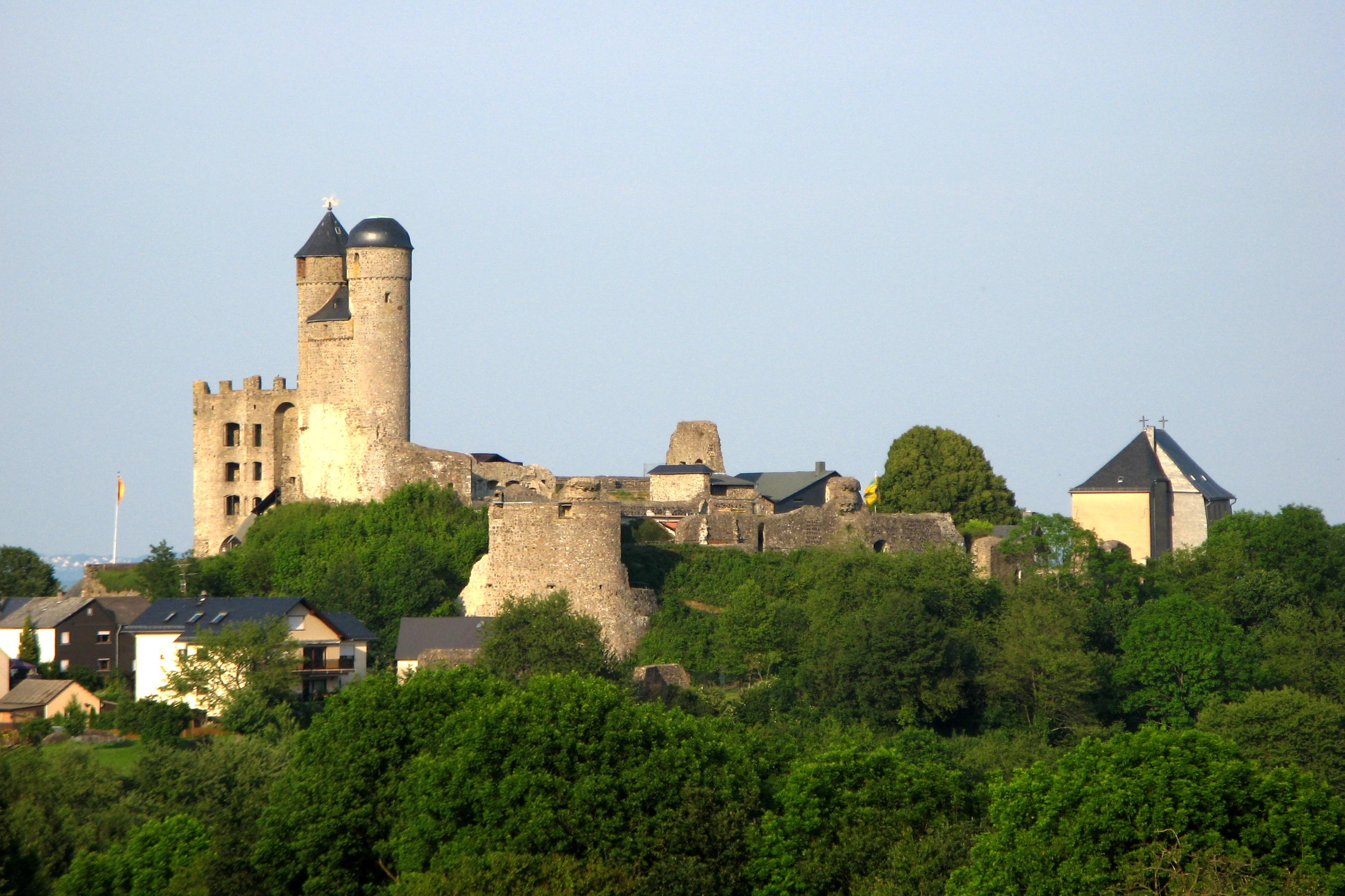 Gesamtansicht der Burg Greifenstein